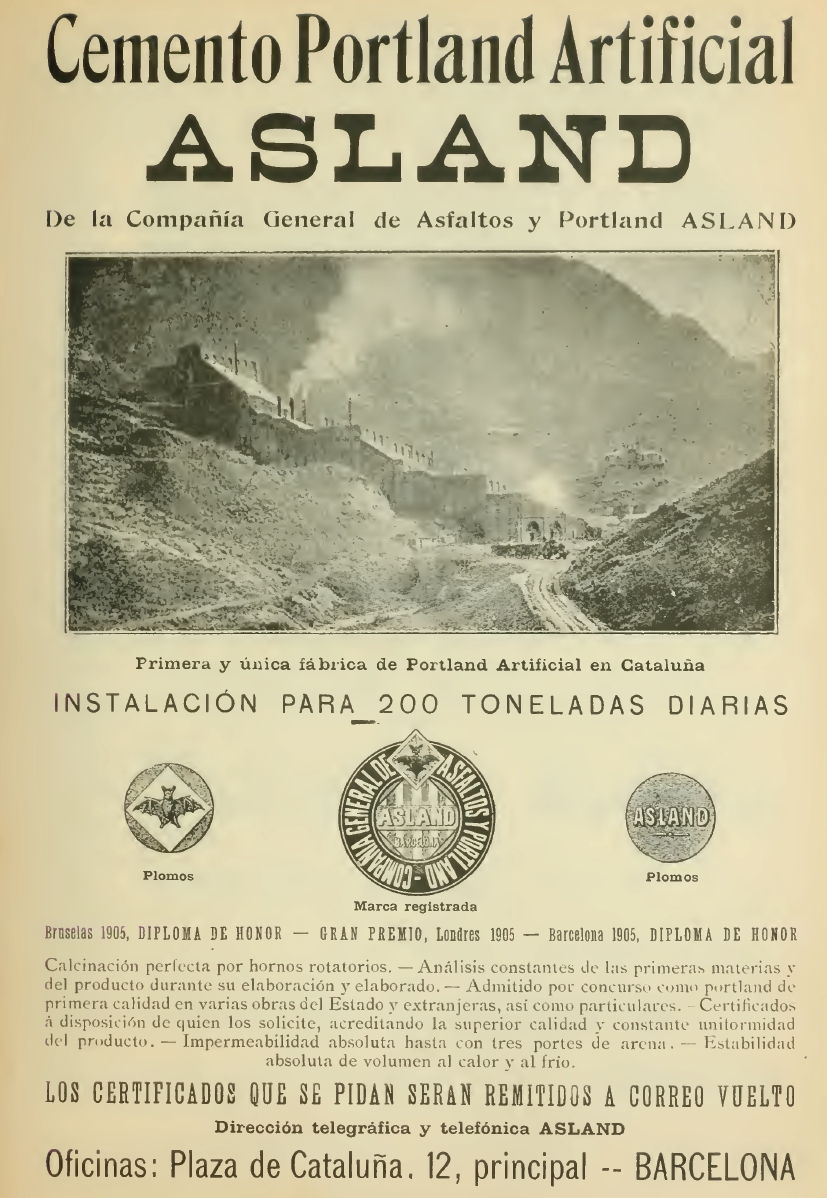 Anunci de la fàbrica de ciments Asland de Castellar de N'hug